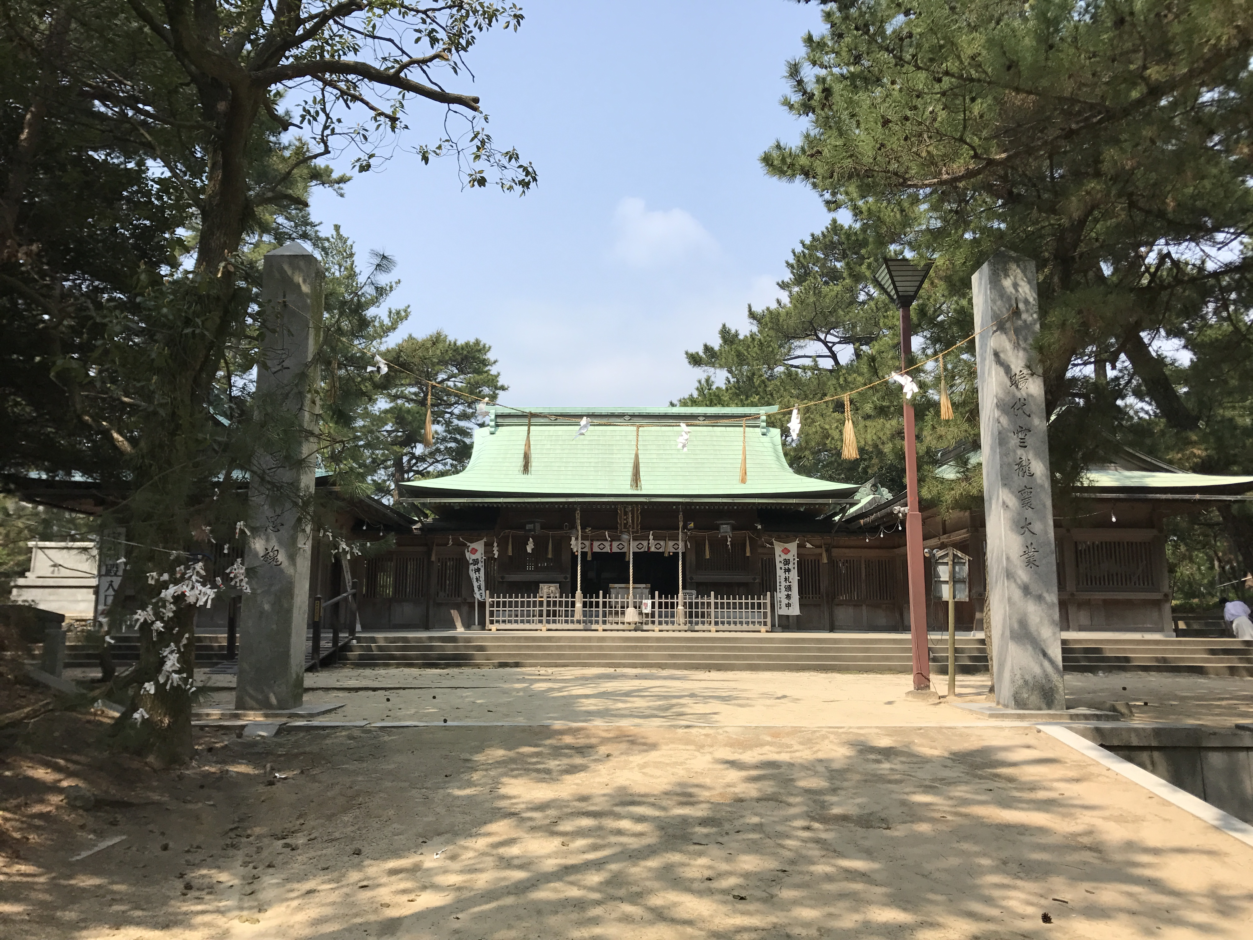 中山神社の拝殿